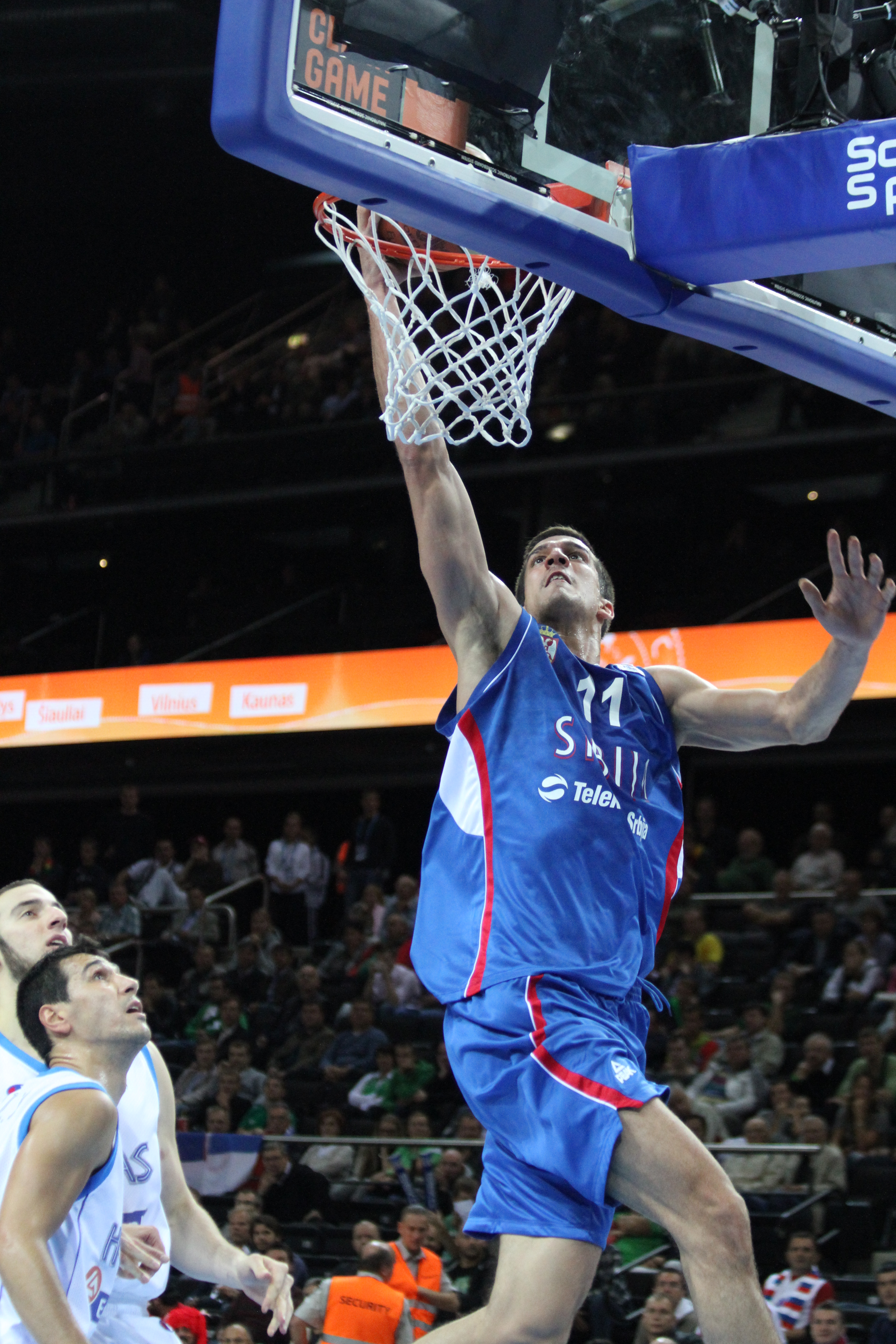 Marko Kešelj à l'EuroBasket 2011, match de la Serbie contre la Grèce le 16 septembre 2011.